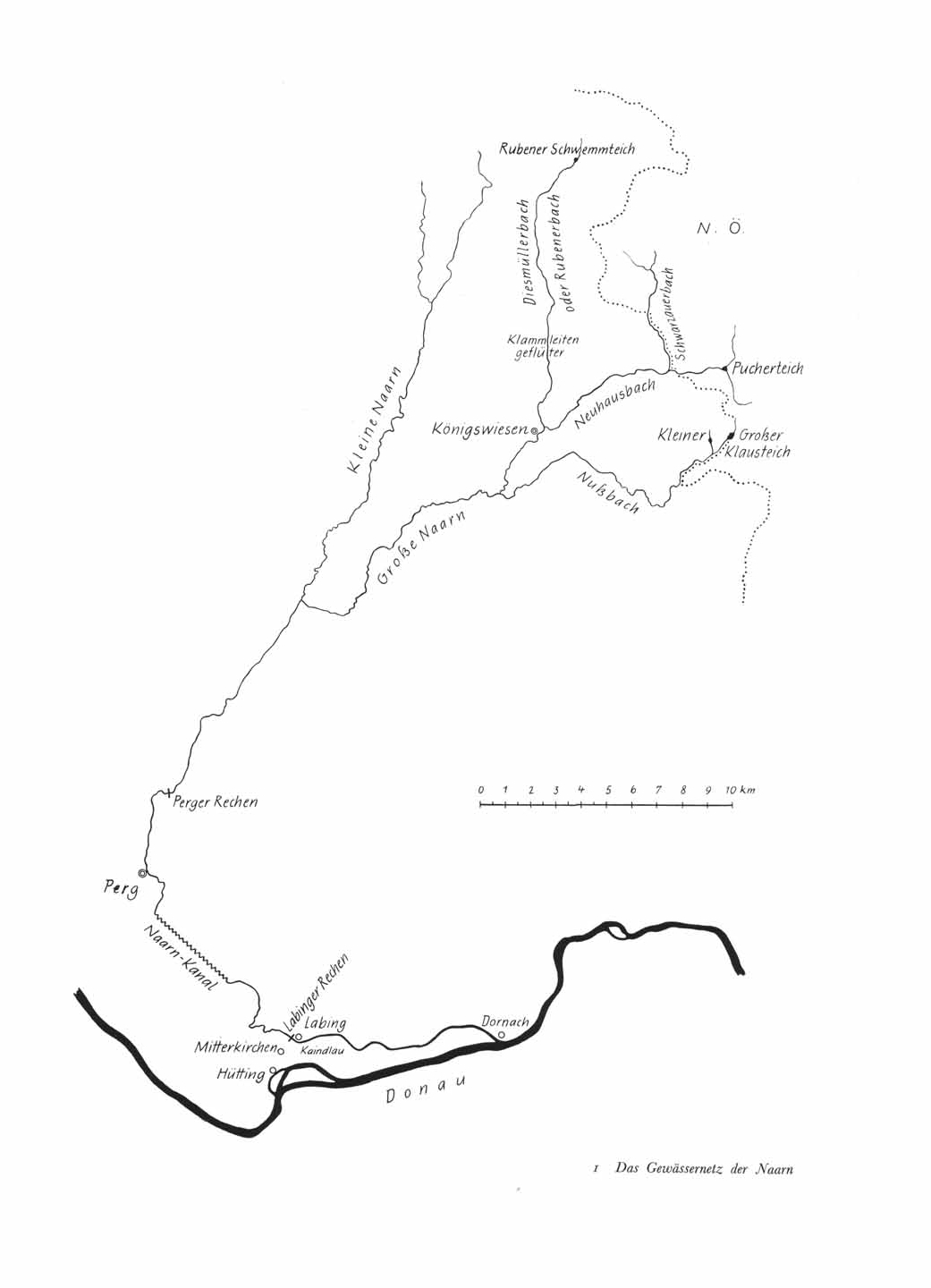 Scheiterschwemme auf der Naarn, Skizze des Gewässernetzes der Naarn